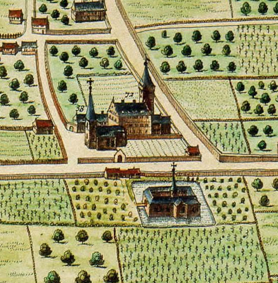 extrait de la carte de Liège de Johan Blaeu, XVIe siècle: L'église Sainte Véronique, le couvent des sœurs angelines et le couvent des Guillemins